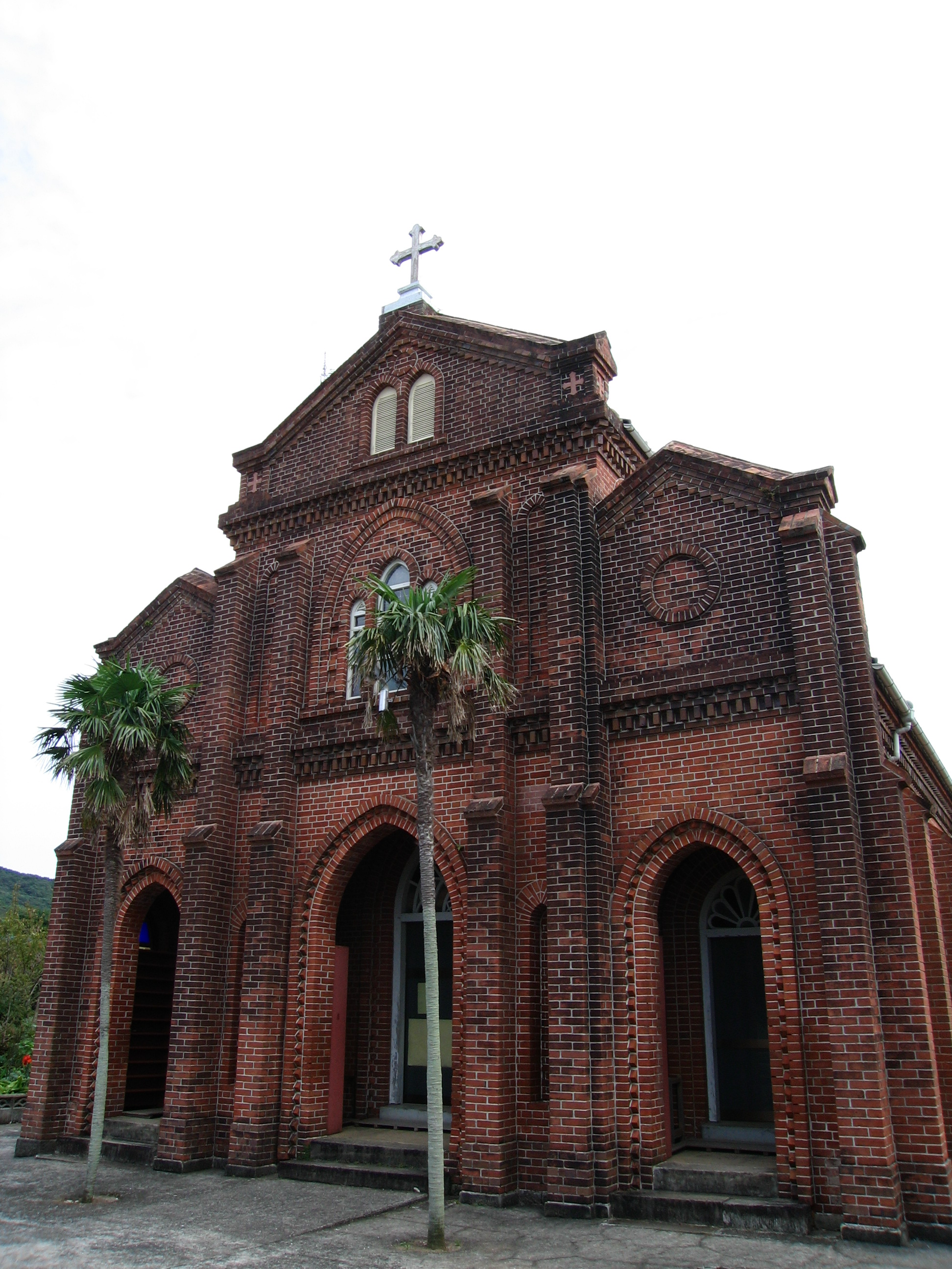 Kusuhara Church in Nagasaki